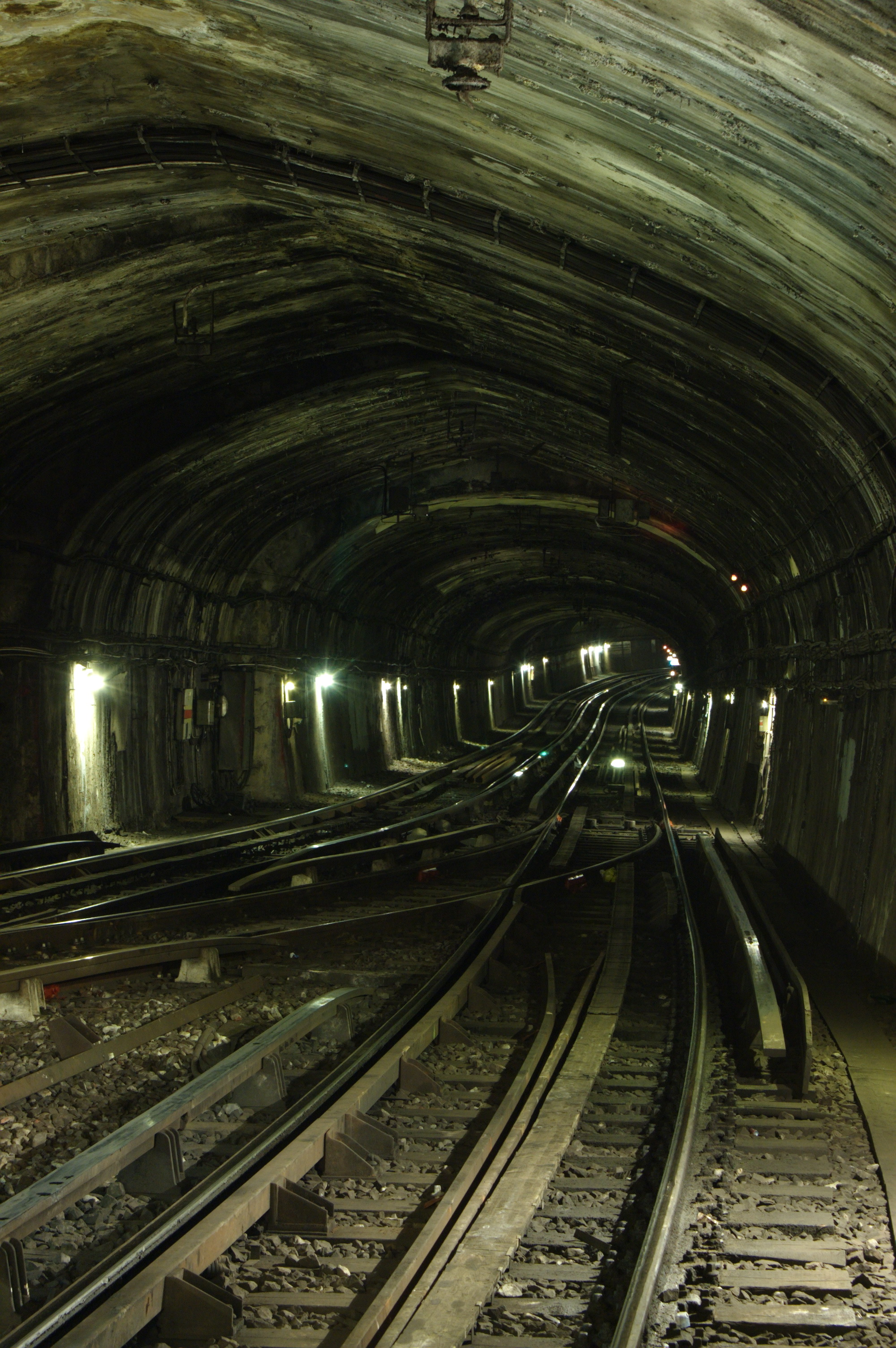 Tunnel de la station de métro Château-Landon sur la ligne 7 du métro parisien.